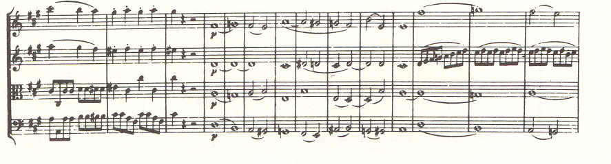 koraalmotief in 4e deel KV 464